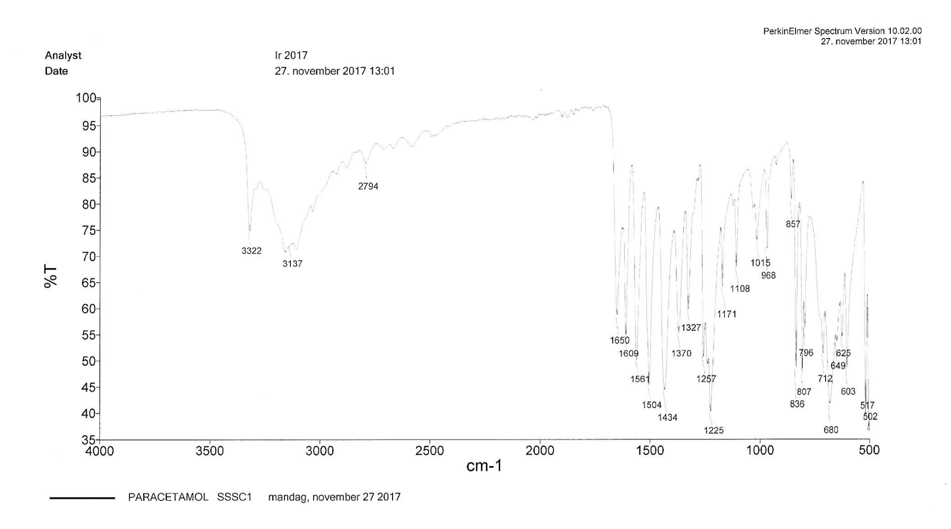 IR af eget syntiserede paracetamol